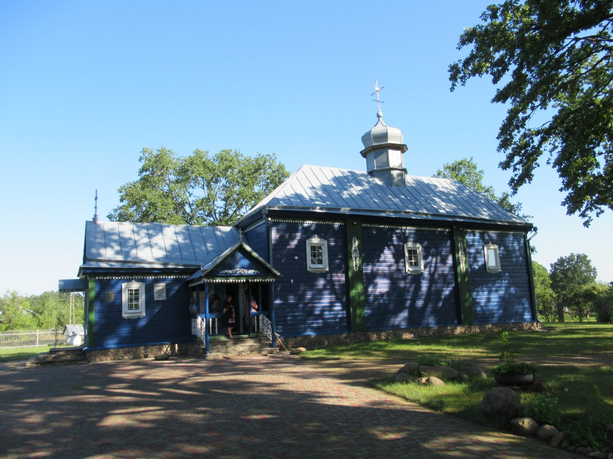 Лелікава. Царква